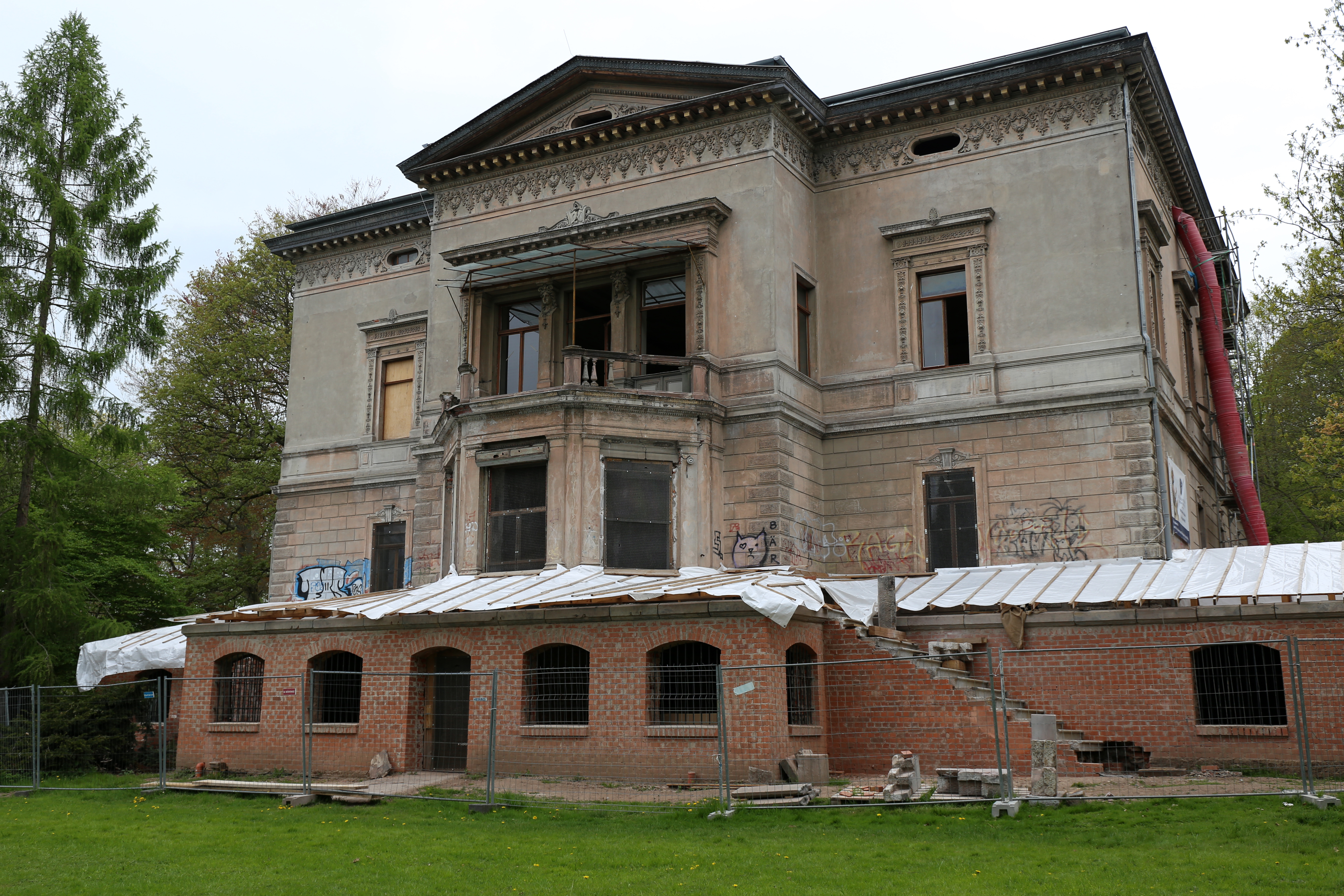 Villa Kneiff im Park Hohenrode